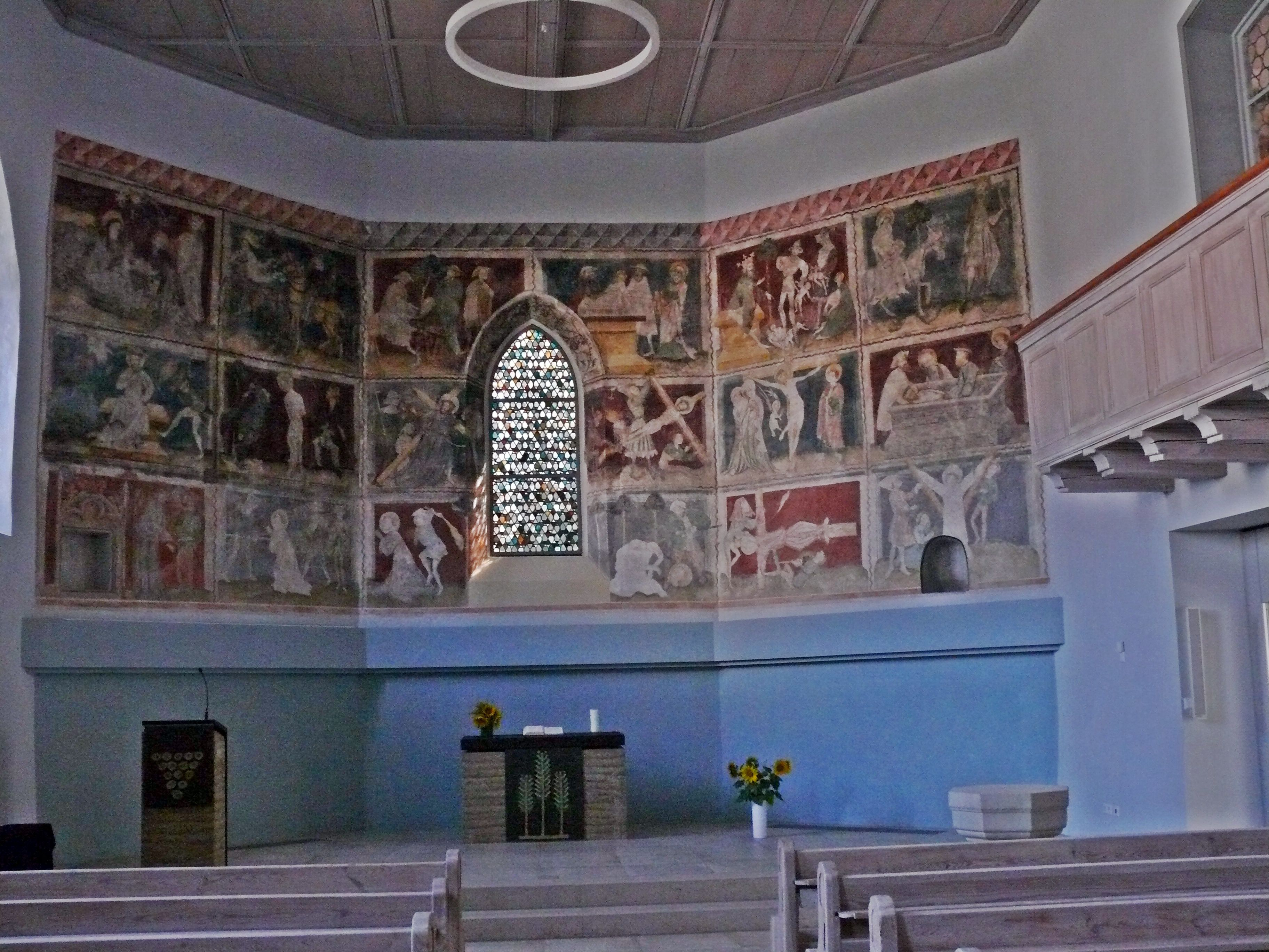 Zell unter Aichelberg: Martinskirche, Fresken um 1430 (Ostwand)